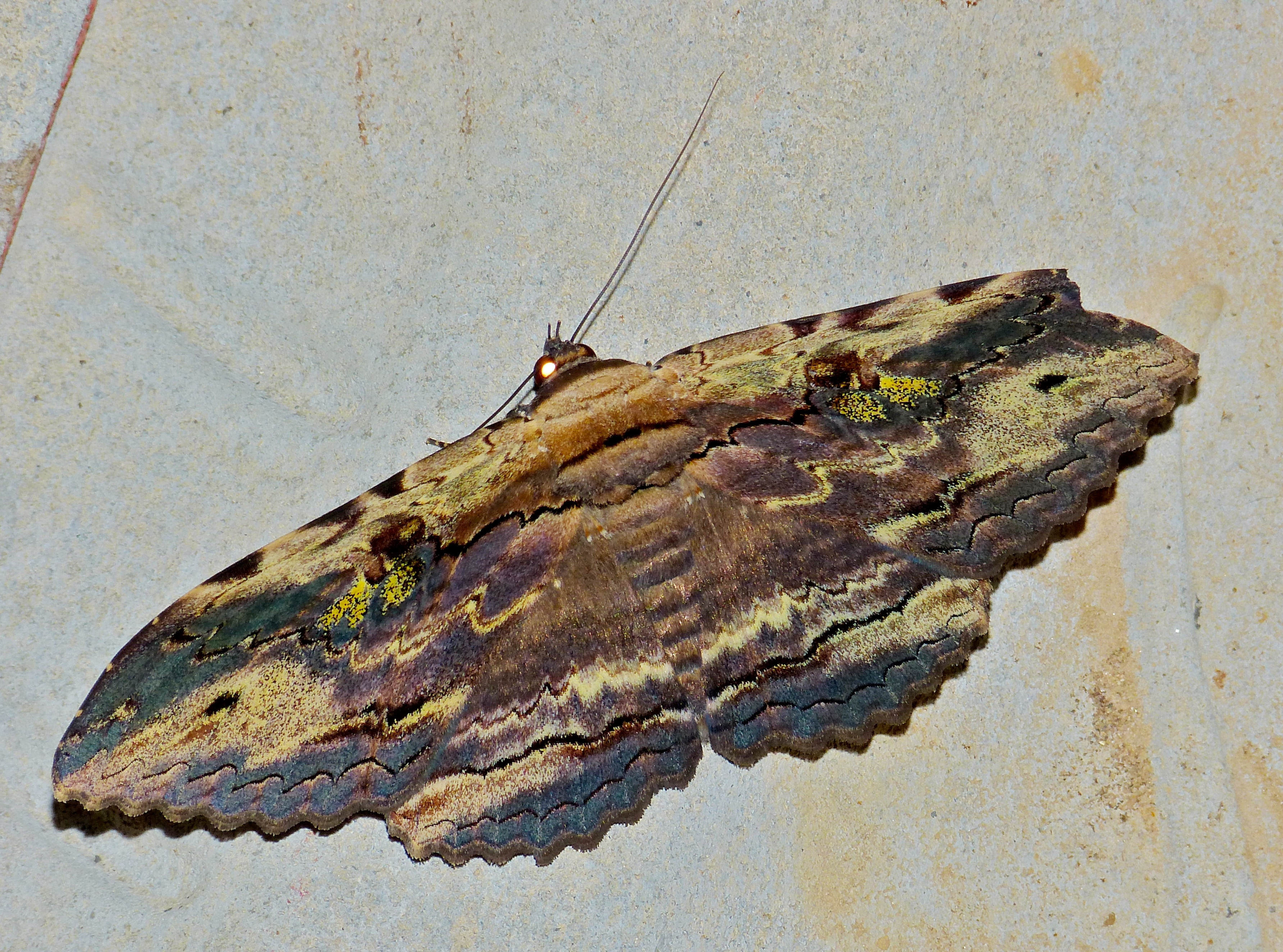 Taman Negara NP, Pahang, MALAYSIA